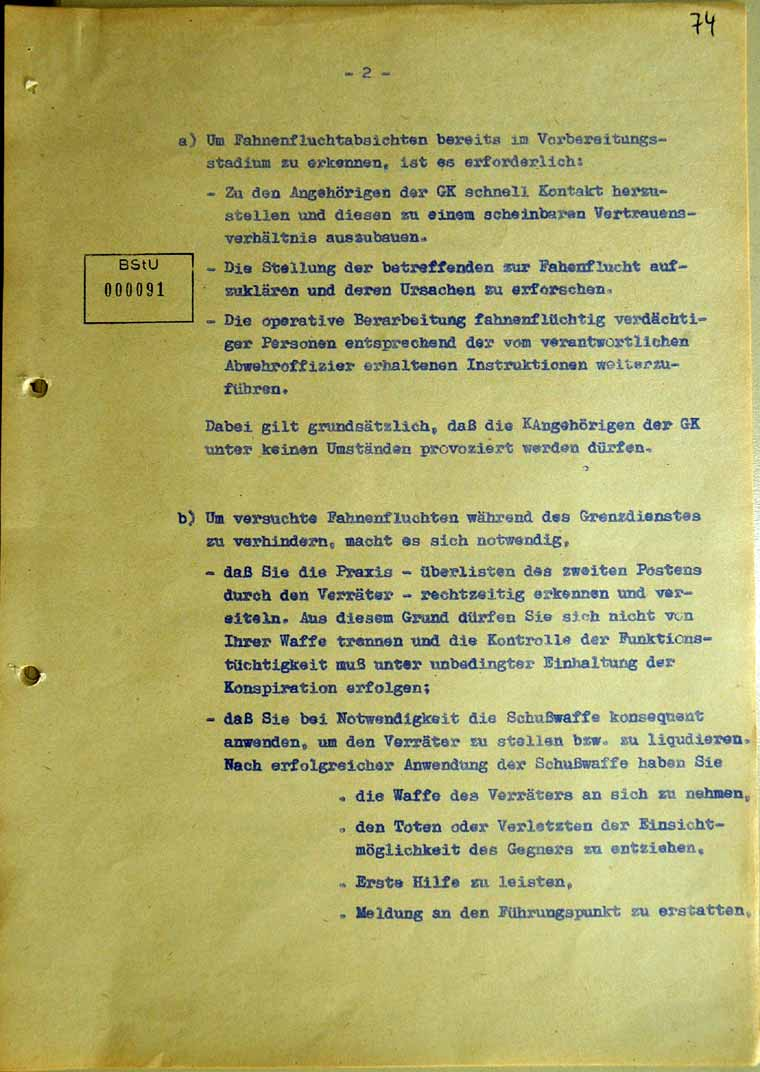 Schießbefehl der Einsatzkompanie der Hauptabteilung I „NVA und Grenztruppen“ des MfS, Seite 2